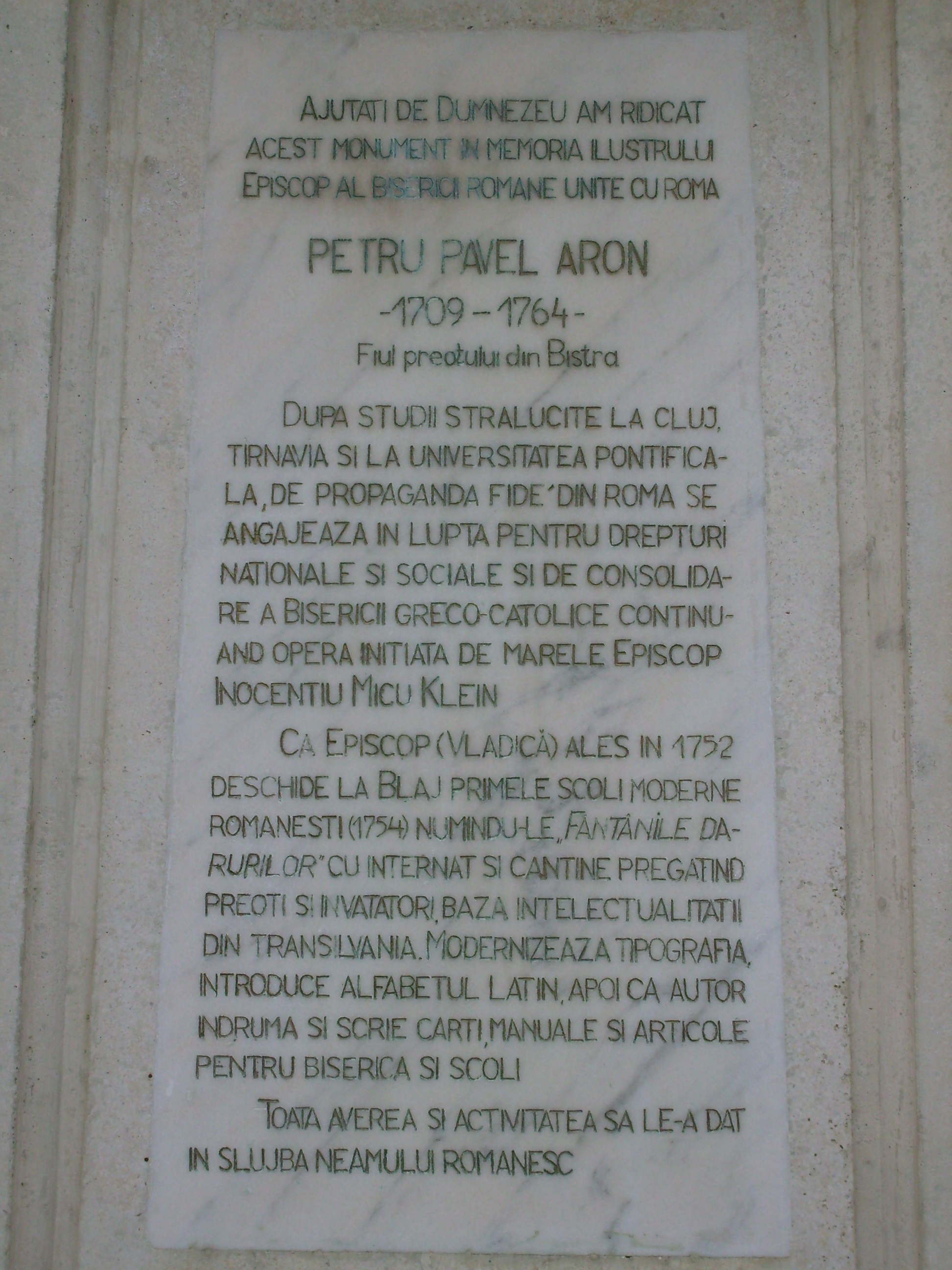 Placa memoriala Petru Pavel Aron din Bistra.